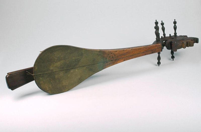 Snaarinstrument. Langhalsluit met vier snaren Unknown language: Gambus